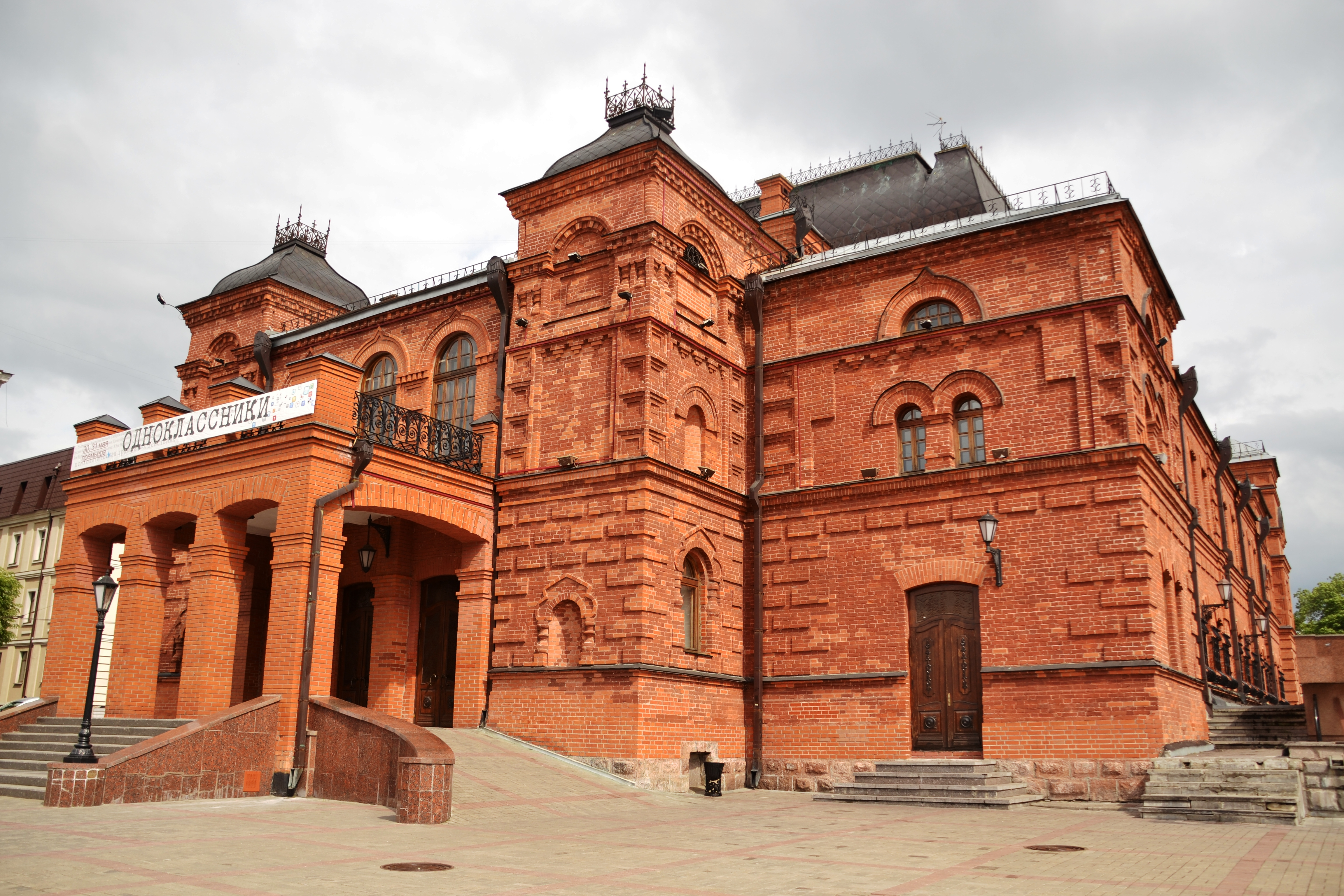 Беларуская (тарашкевіца): Будынак гарадзкога тэатра. г. Магілёў This is a photo of Belarusian heritage monument. Reference number: 513Г000585 ( WLM)